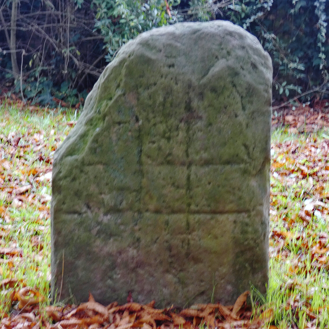 Die Kreuzsteine, oder früher die 5 Steine, sind eine Gruppe von Kreuzsteinen in Hiddestorf, einem Stadtteil von Hemmingen in der Region Hannover in Niedersachsen